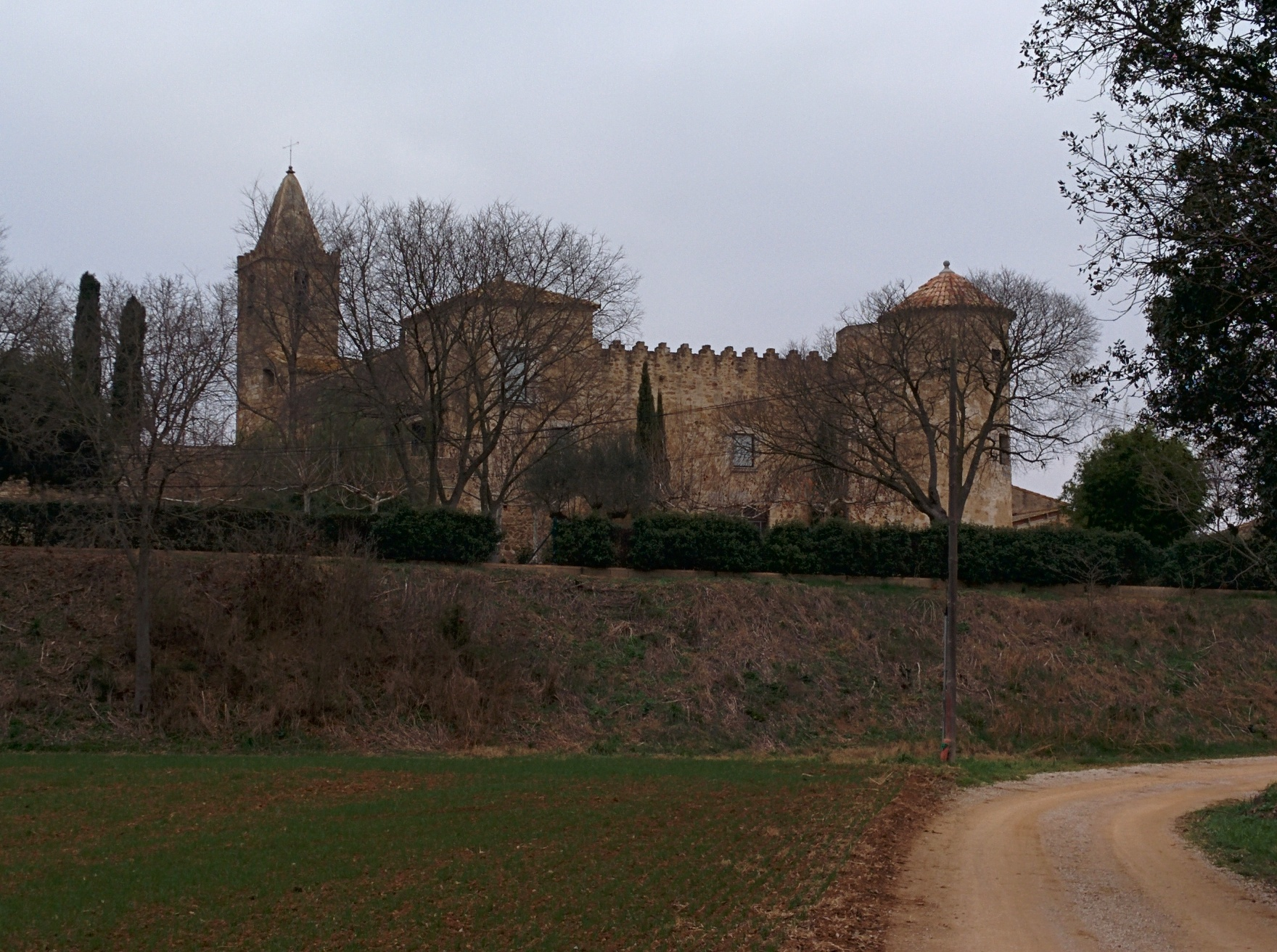 Església parroquial de Sant Cugat (Cornellà del Terri)